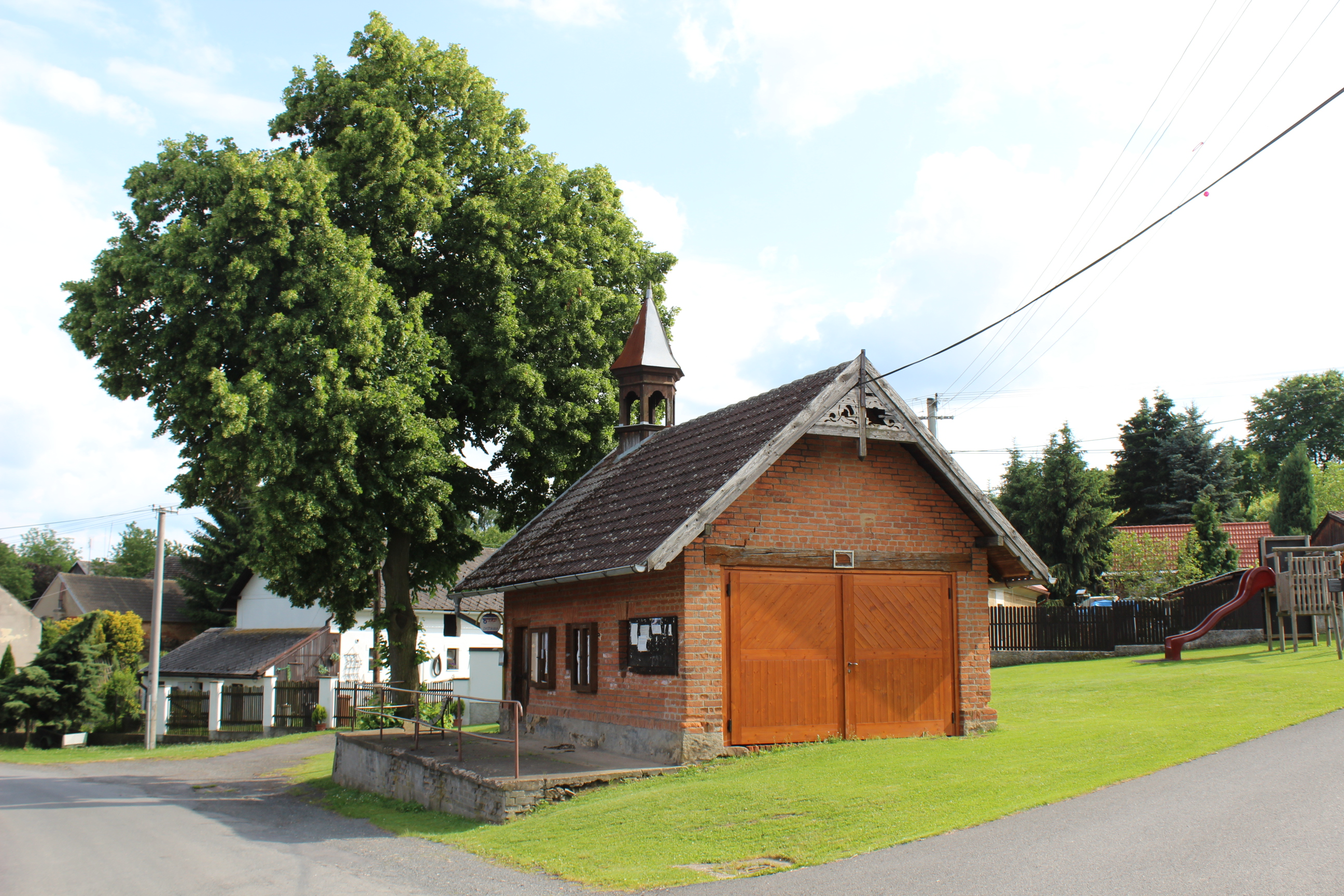 Kaplička v Tytrech.